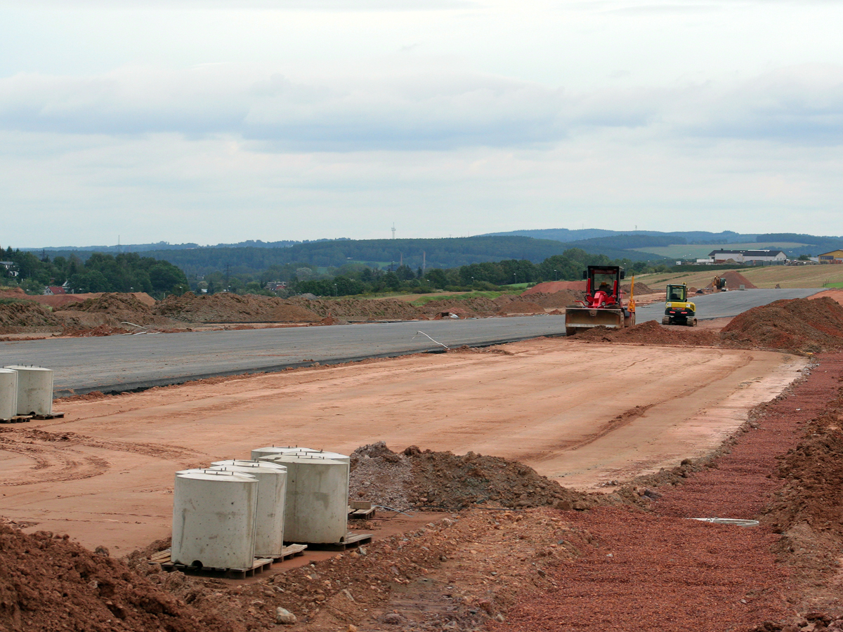 Aspahltierung der SLB